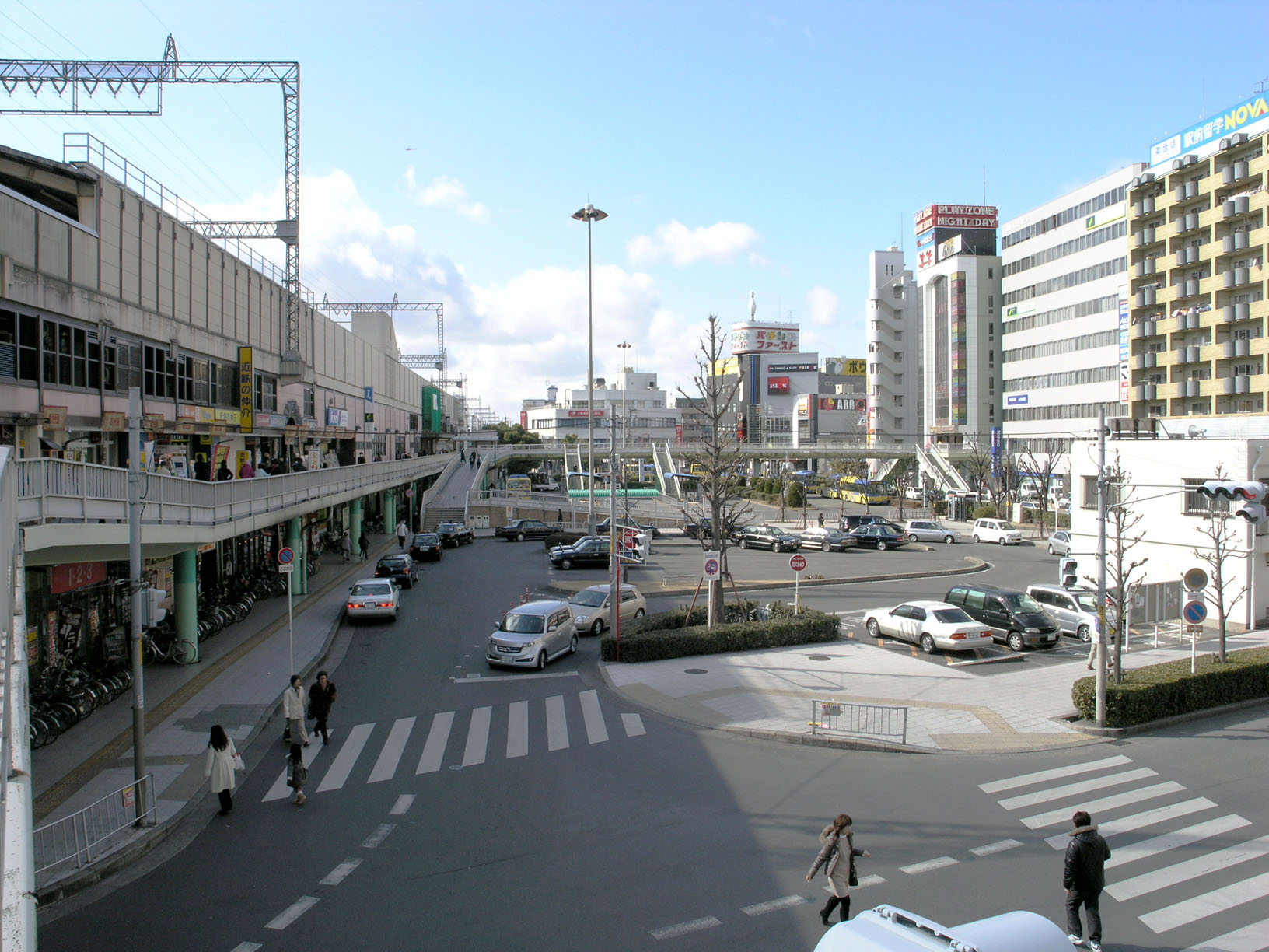 Kintetsu Yao station in Yao, Osaka, Japan